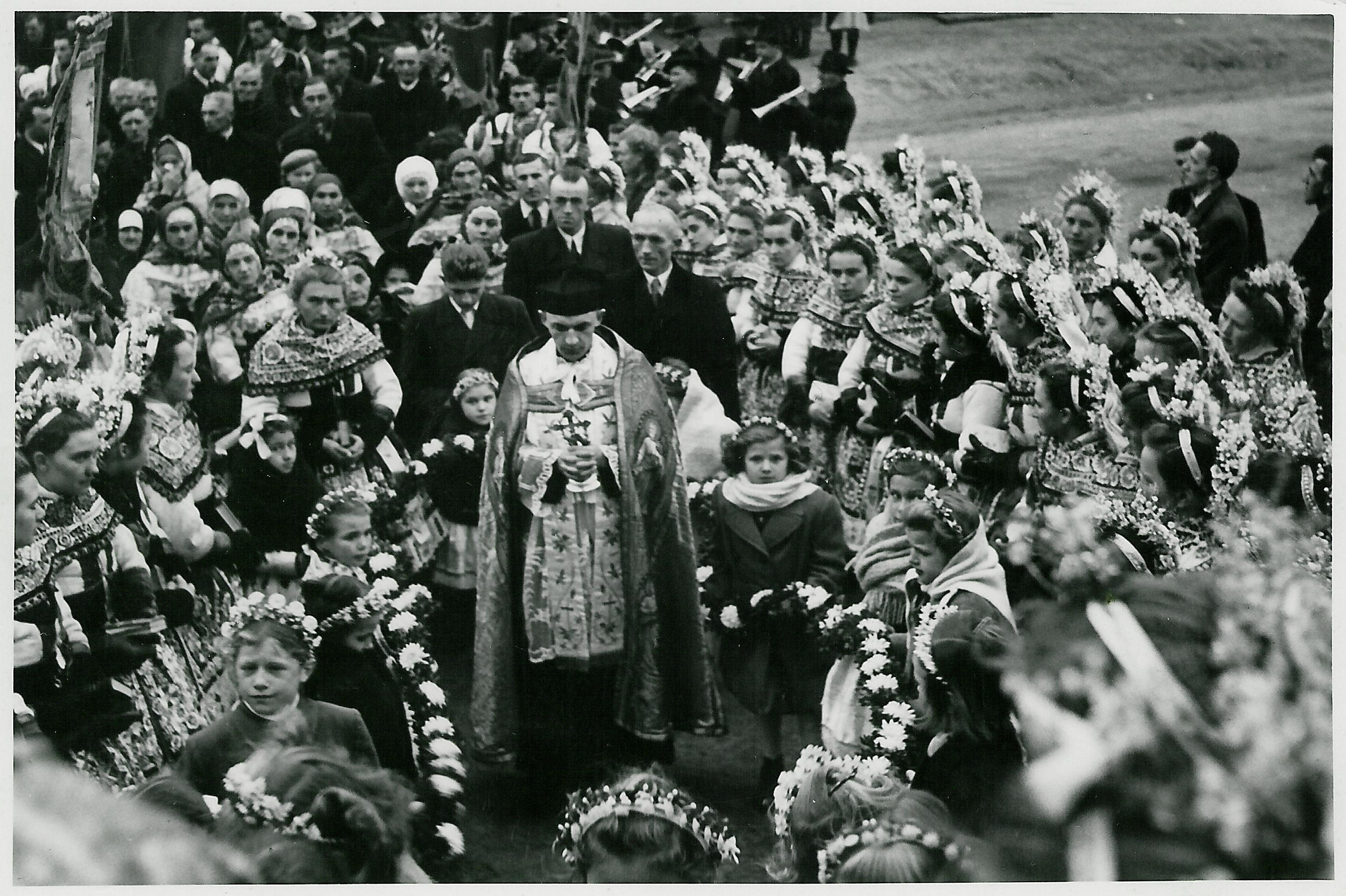 Primice P. Jana Krista, Milotice, prosinec 1949